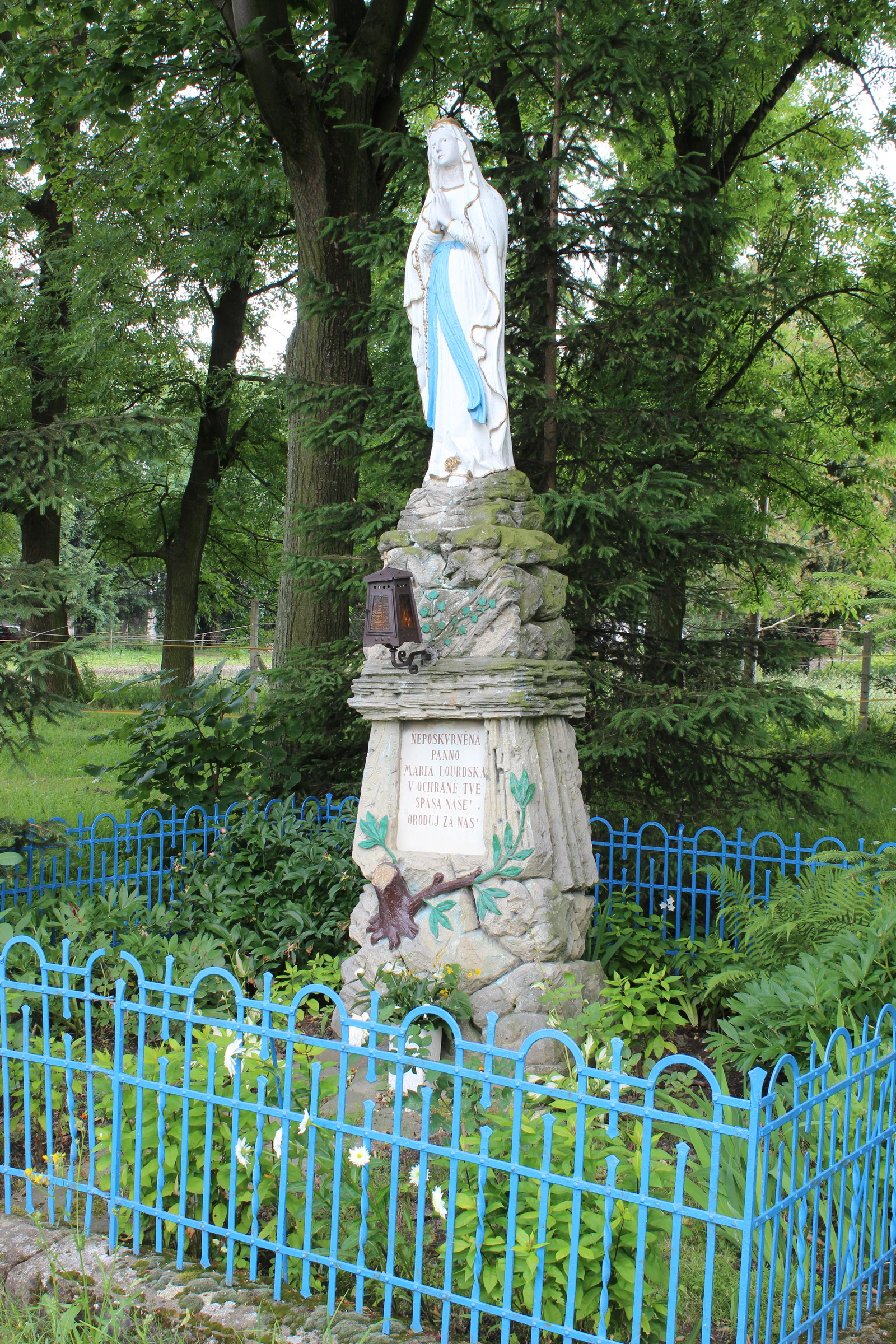 Provodov - Šonov, Šonov u Nového Města nad Metují, socha Panny Marie This photograph was taken with a DSLR from WMCZ's Camera grant.